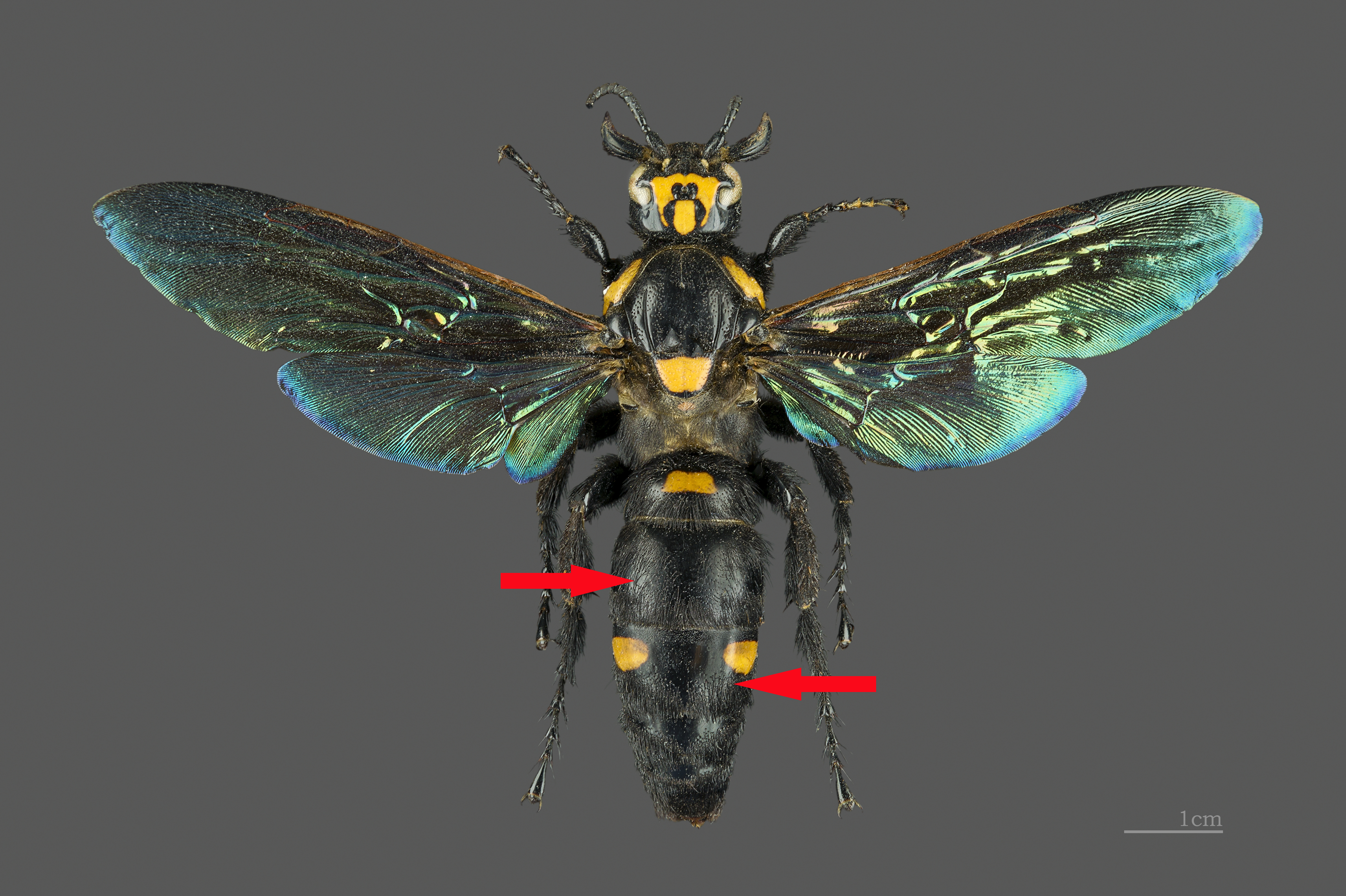 Фотозображення комахи Megascolia_procer